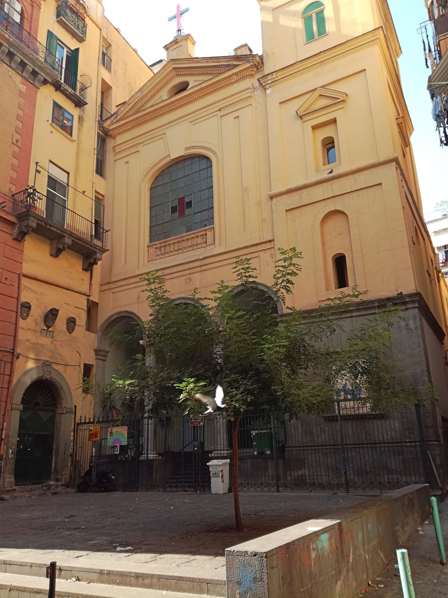 Facciata, Trinità degli Spagnoli, Napoli